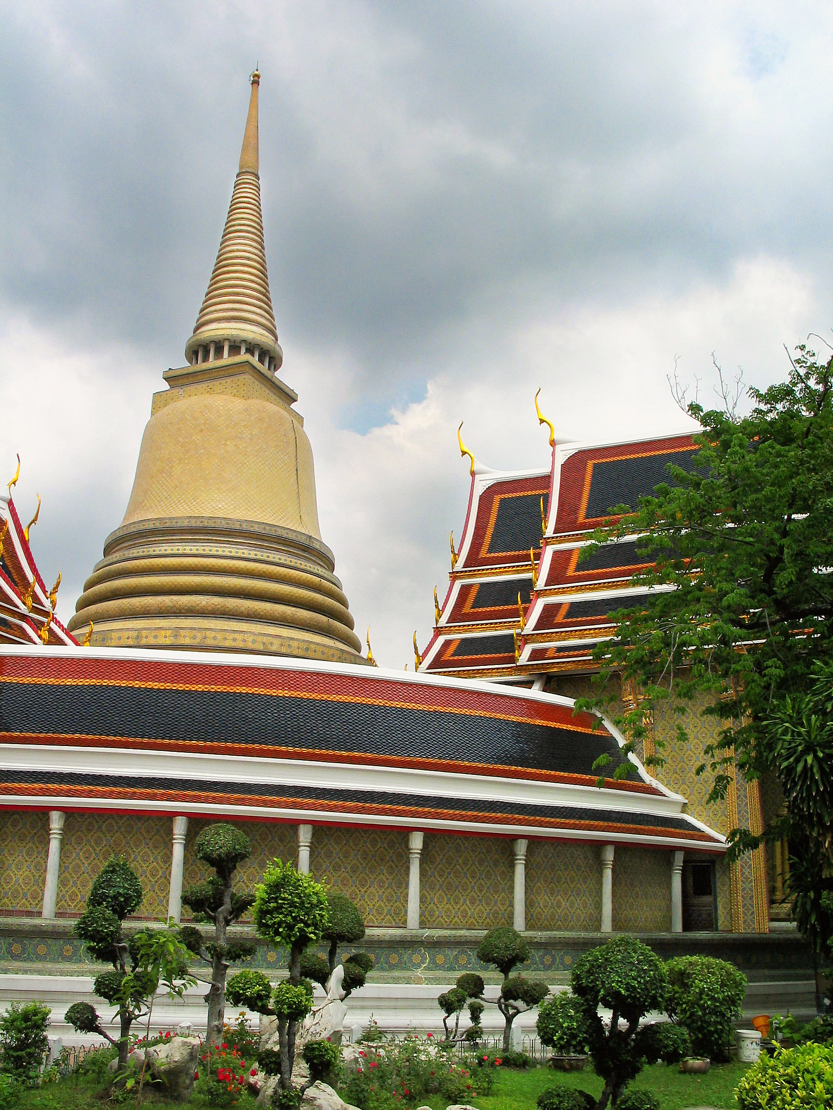 Phra Chedi, Wat Rajabophit, Phra Nakhon district, Bangkok Thailand